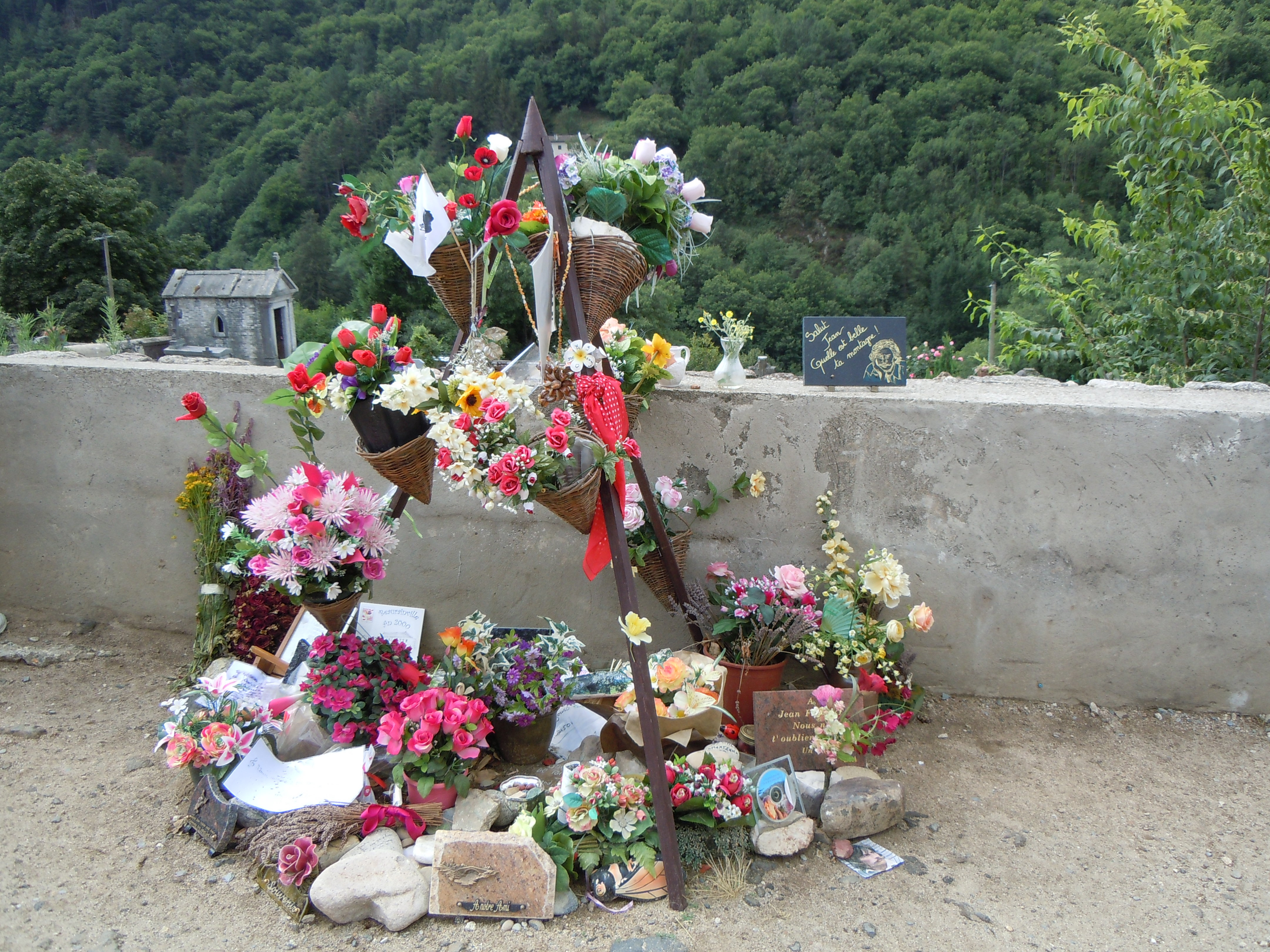 En souvenir de Jean Ferrat - Cimetière d'Antraigues-sur-Volane